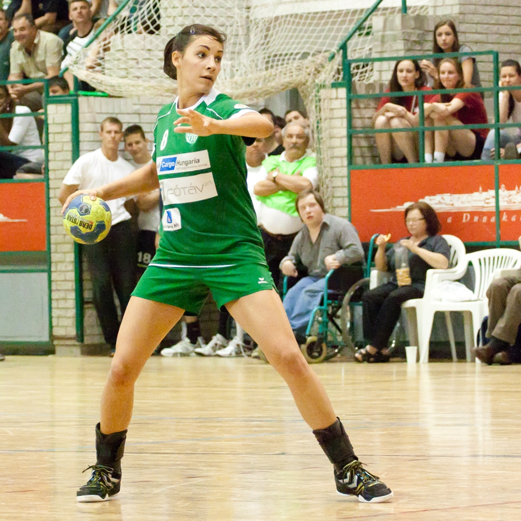 Szucsánszki Zita válogatott magyar kézilabdázó.